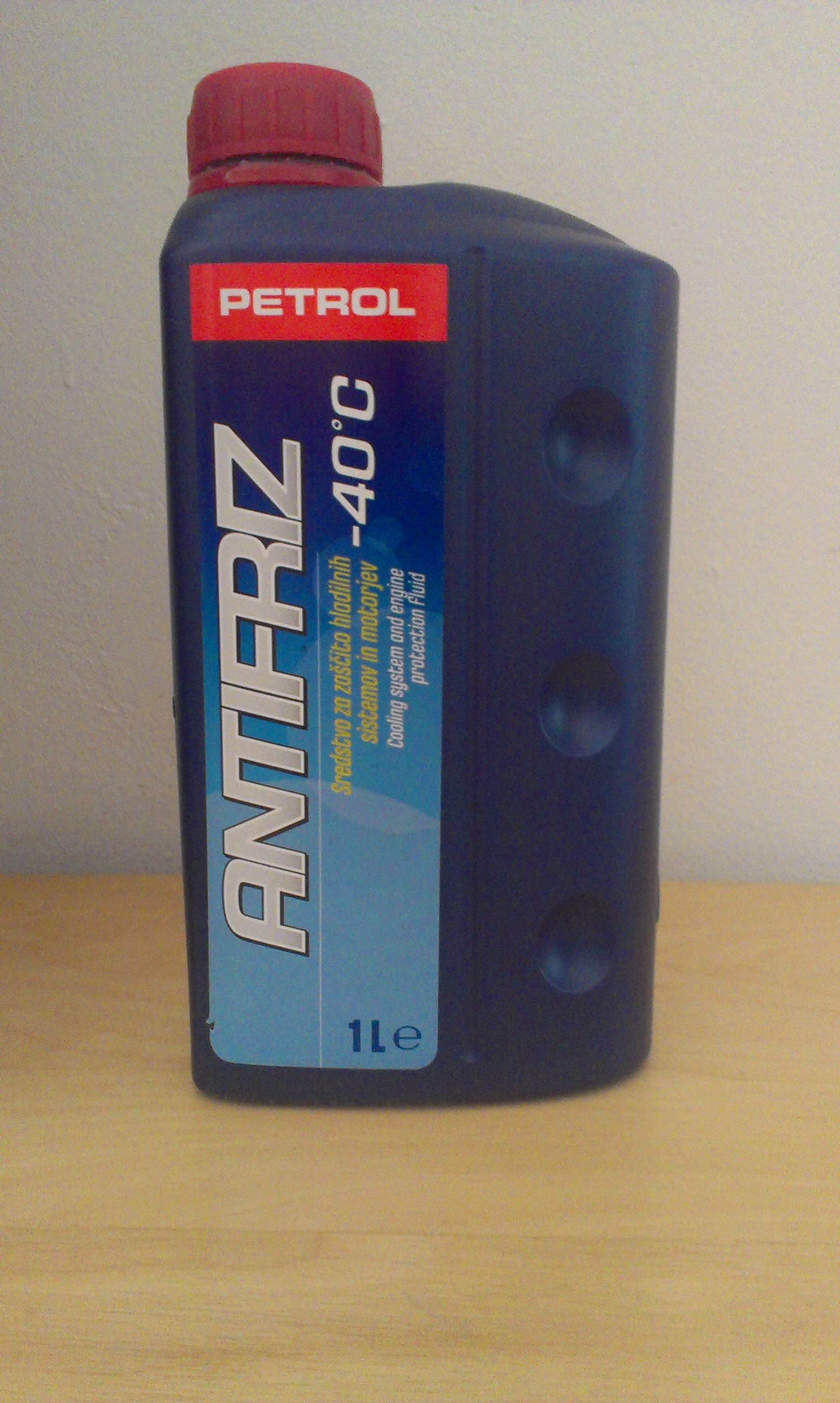 Antifriz Autror:Dalibor Radivojević